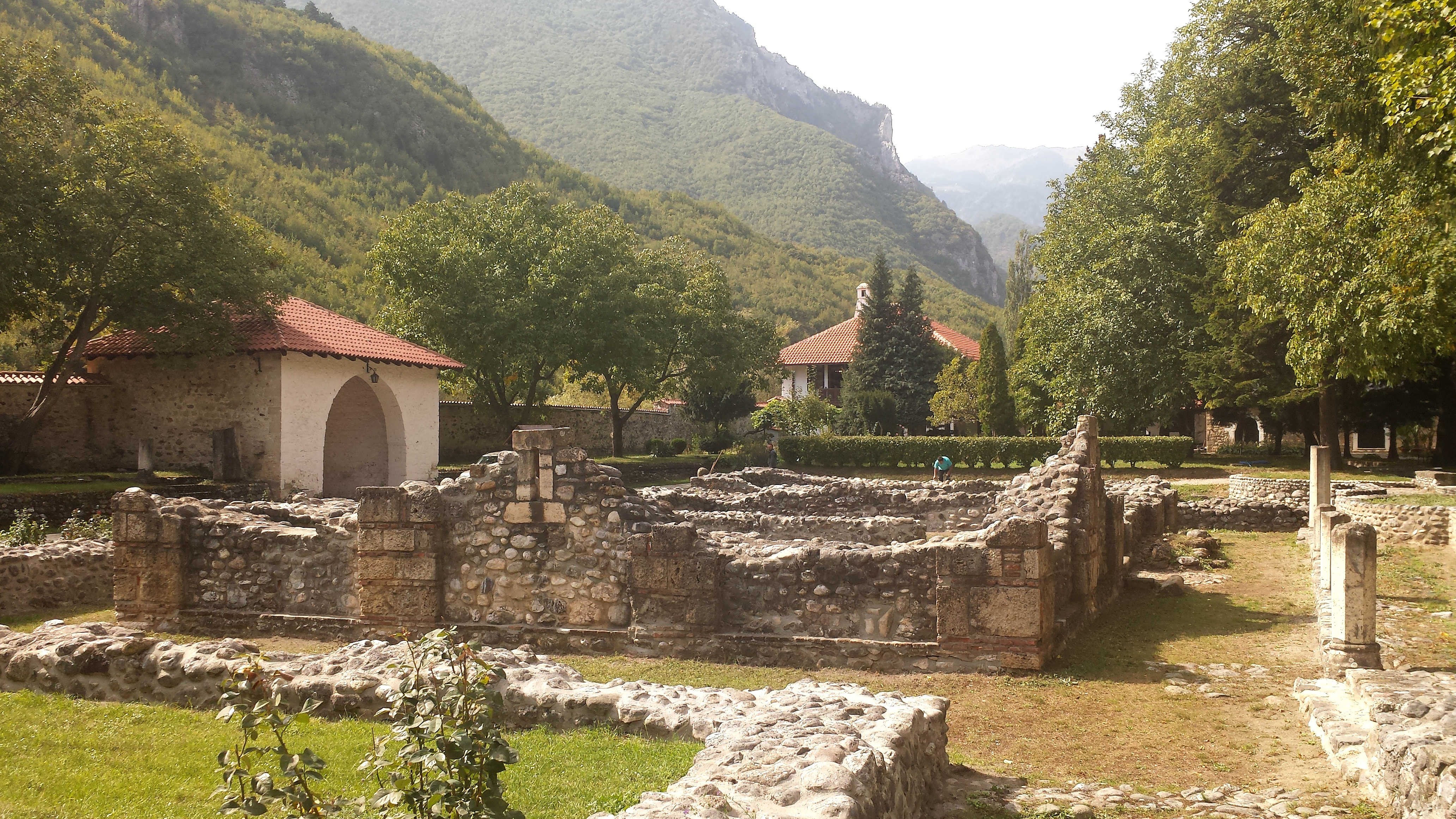 Patrikana e Pejës